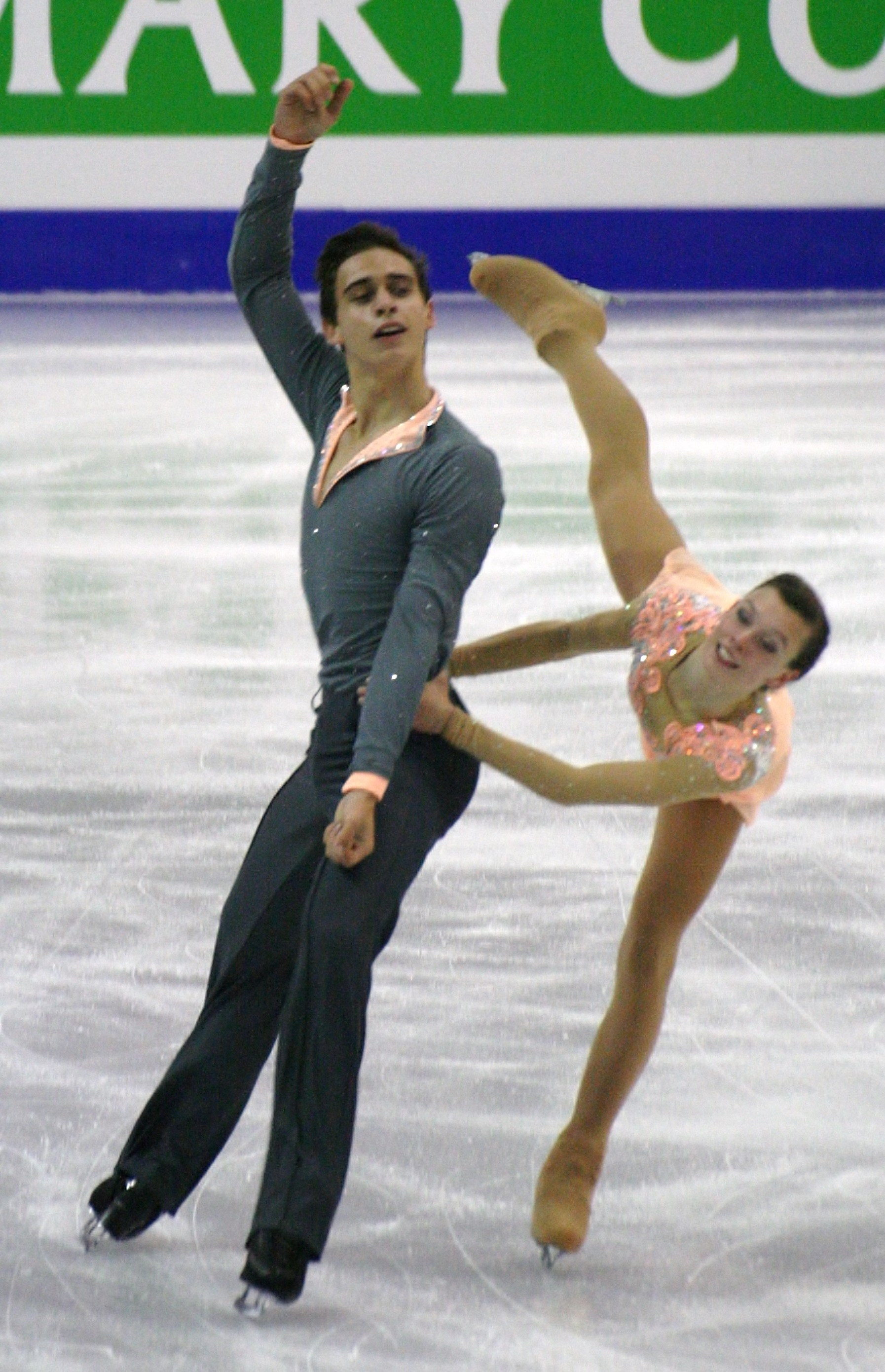 Анна Душкова и Мартин Бидар (Чехия) на финале Гран-при по фигурному катанию среди юниоров 2015-2016.